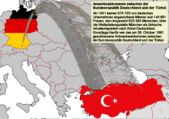 Illustration Anwerbeabkommen zwischen der Bundesrepublik Deutschland und der Türkei